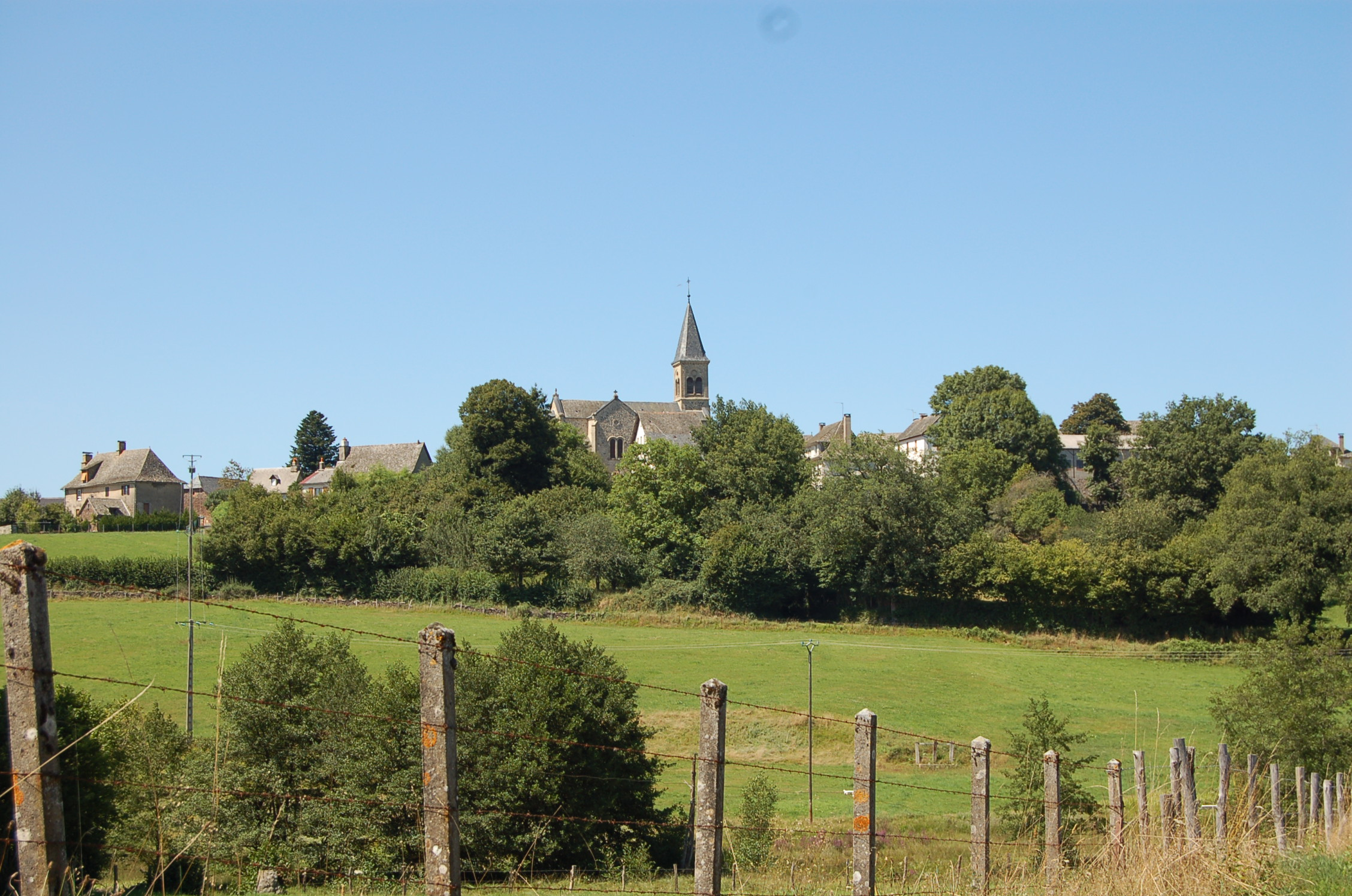 ARNAC vue du village